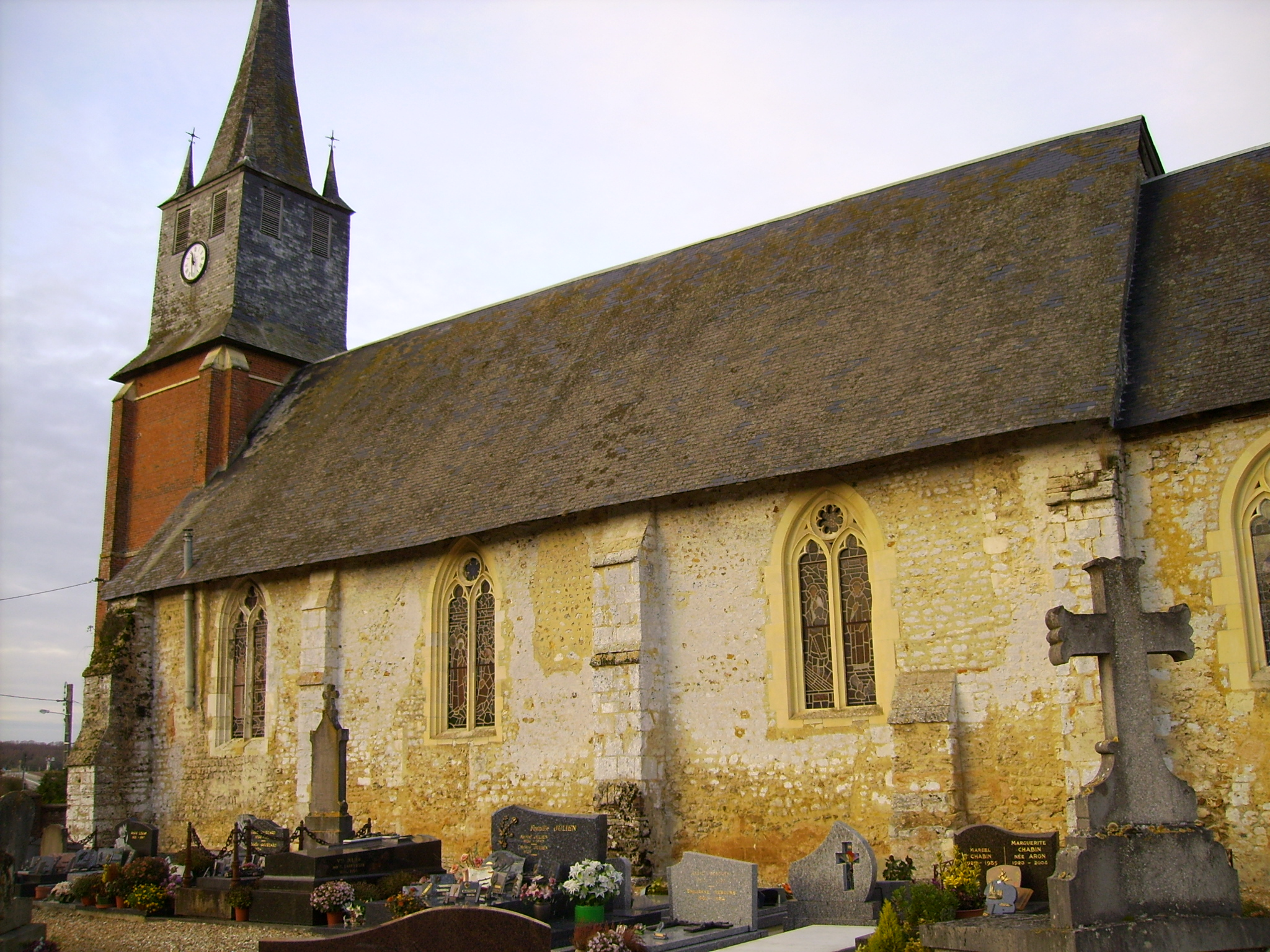 Église de Saint-Pierre-de-Cormeilles (face sud). Église du XIIIe. Church of Saint-Pierre-de-Cormeilles.